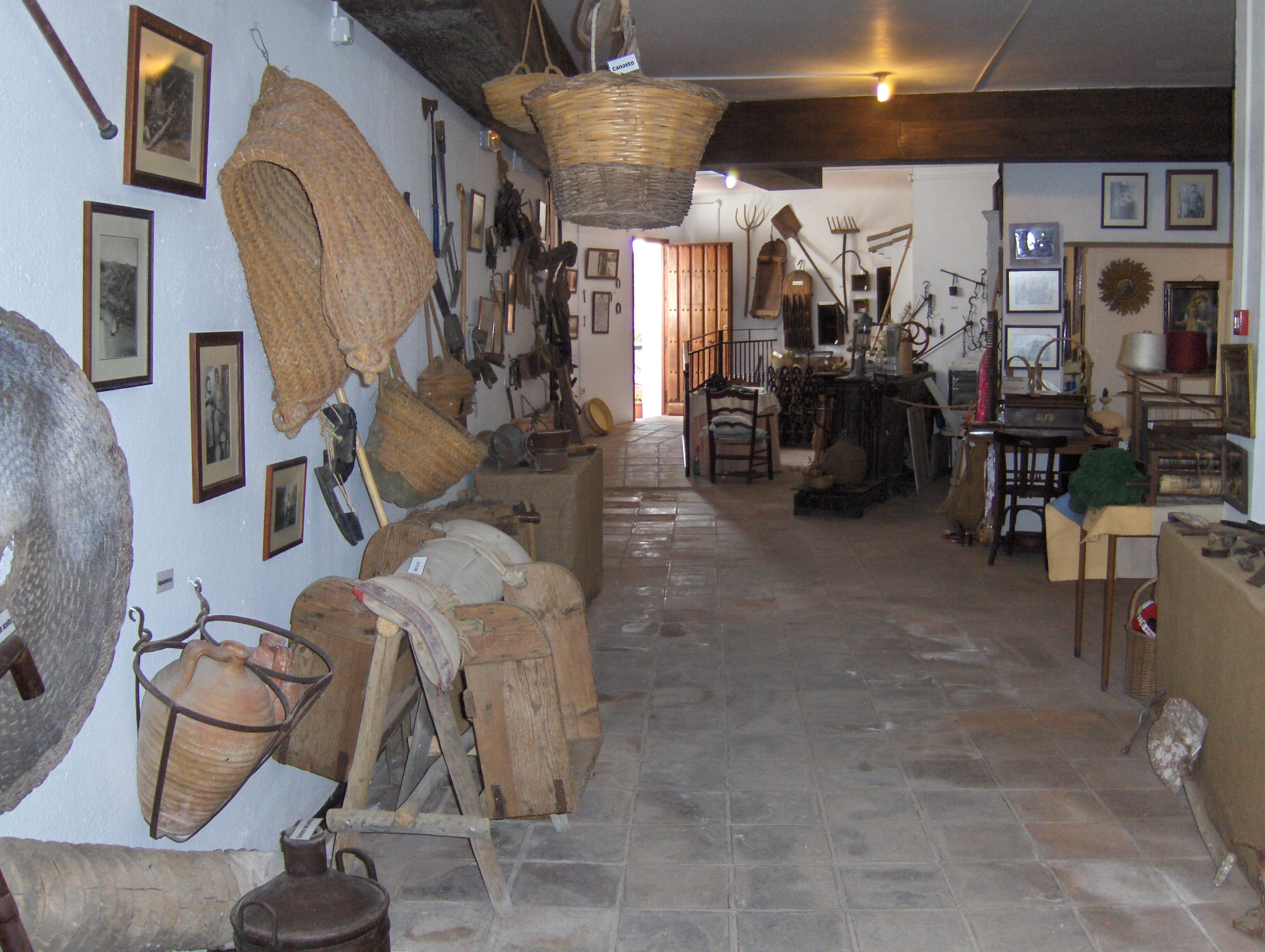 Museo de Artes y Costumbres Populares de Benagalbón, Rincón de la Victoria, Málaga, España.